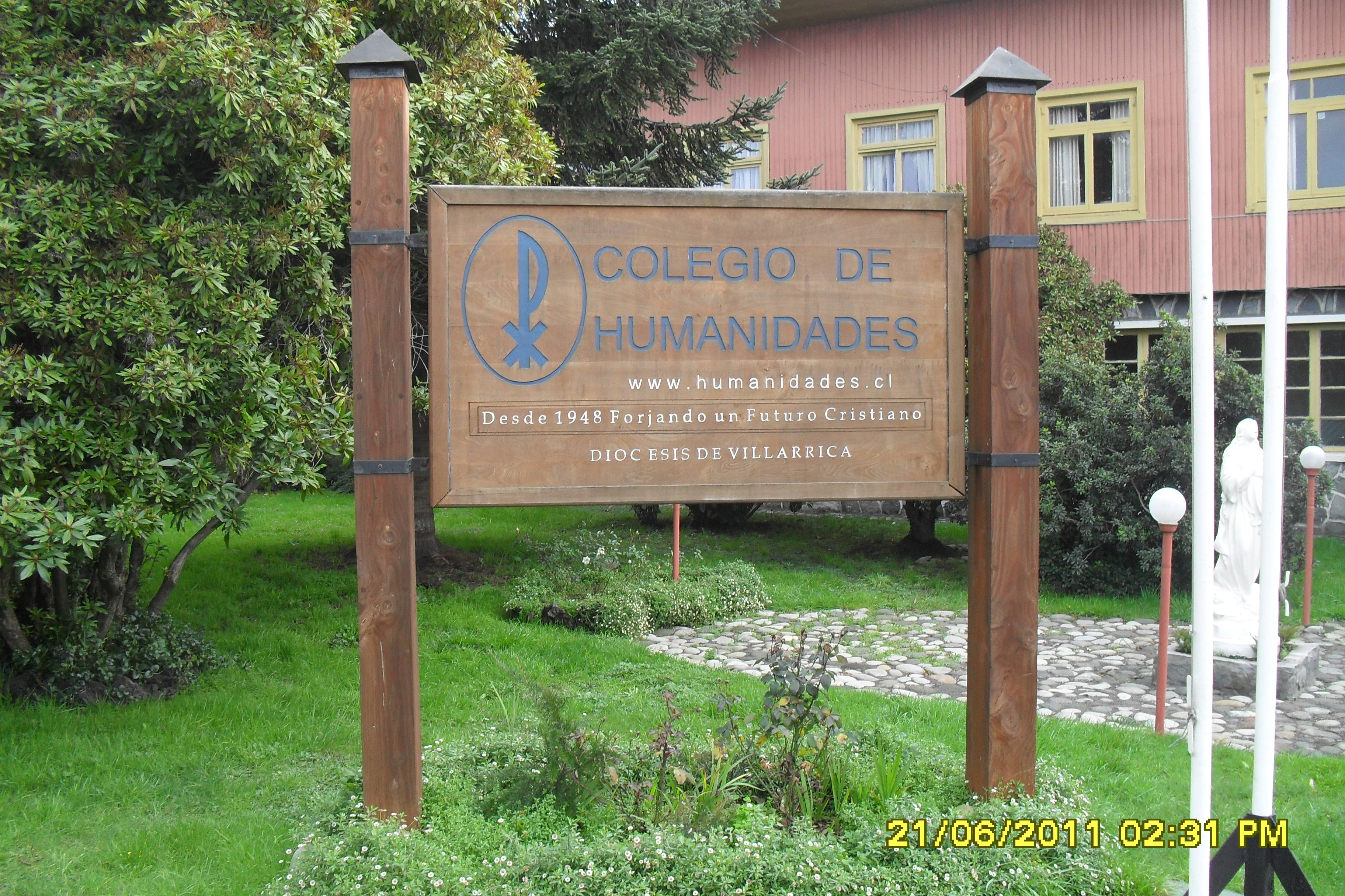 Edificios de Villarrica